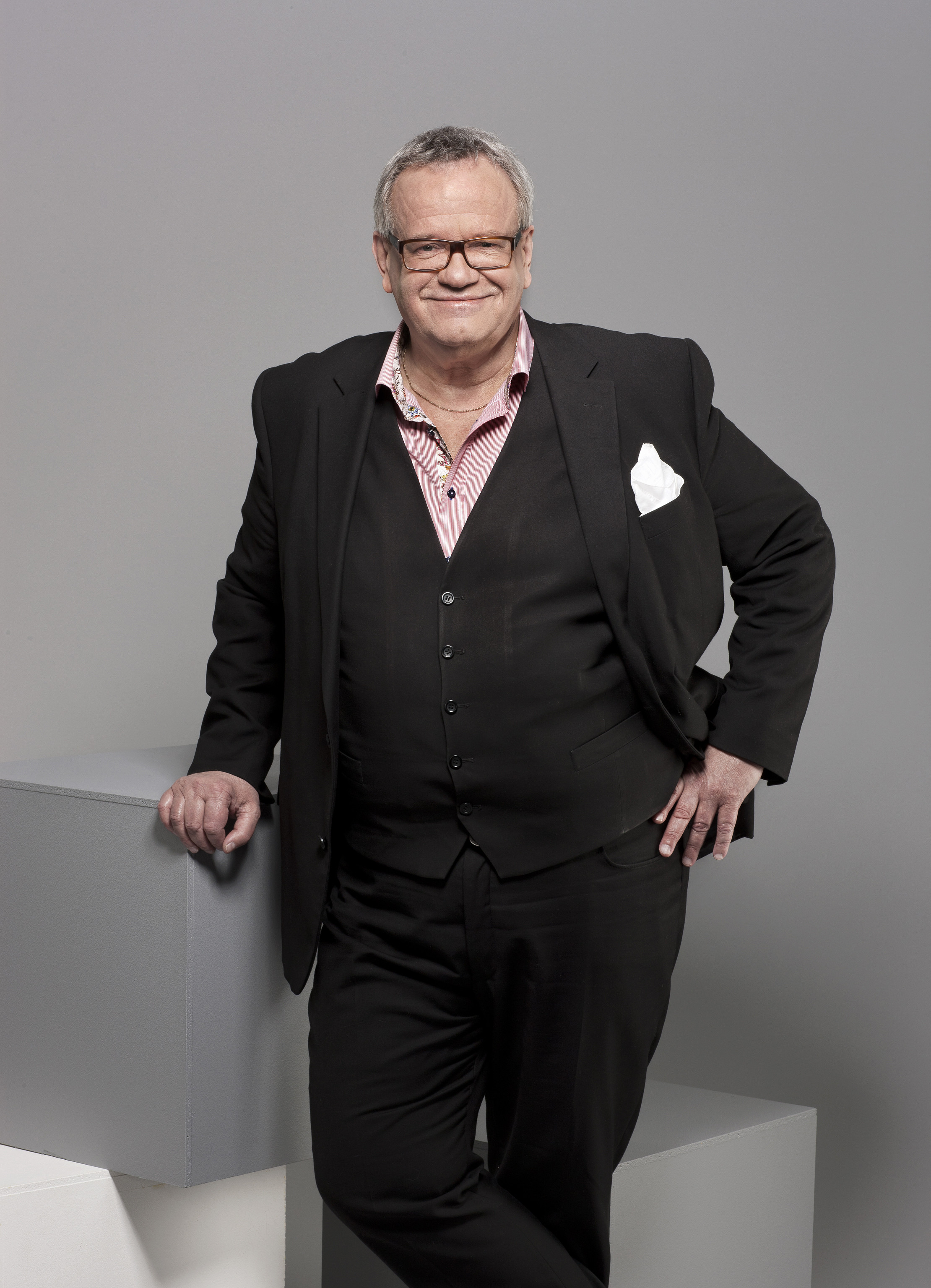 Olle Waller arbetar som sexualupplysare på Lafa-enheten för sexualitet och hälsa inom Stockholms läns landsting. Han har svarat på frågor på webben i 13 år och medverkat i tv sedan år 1999.